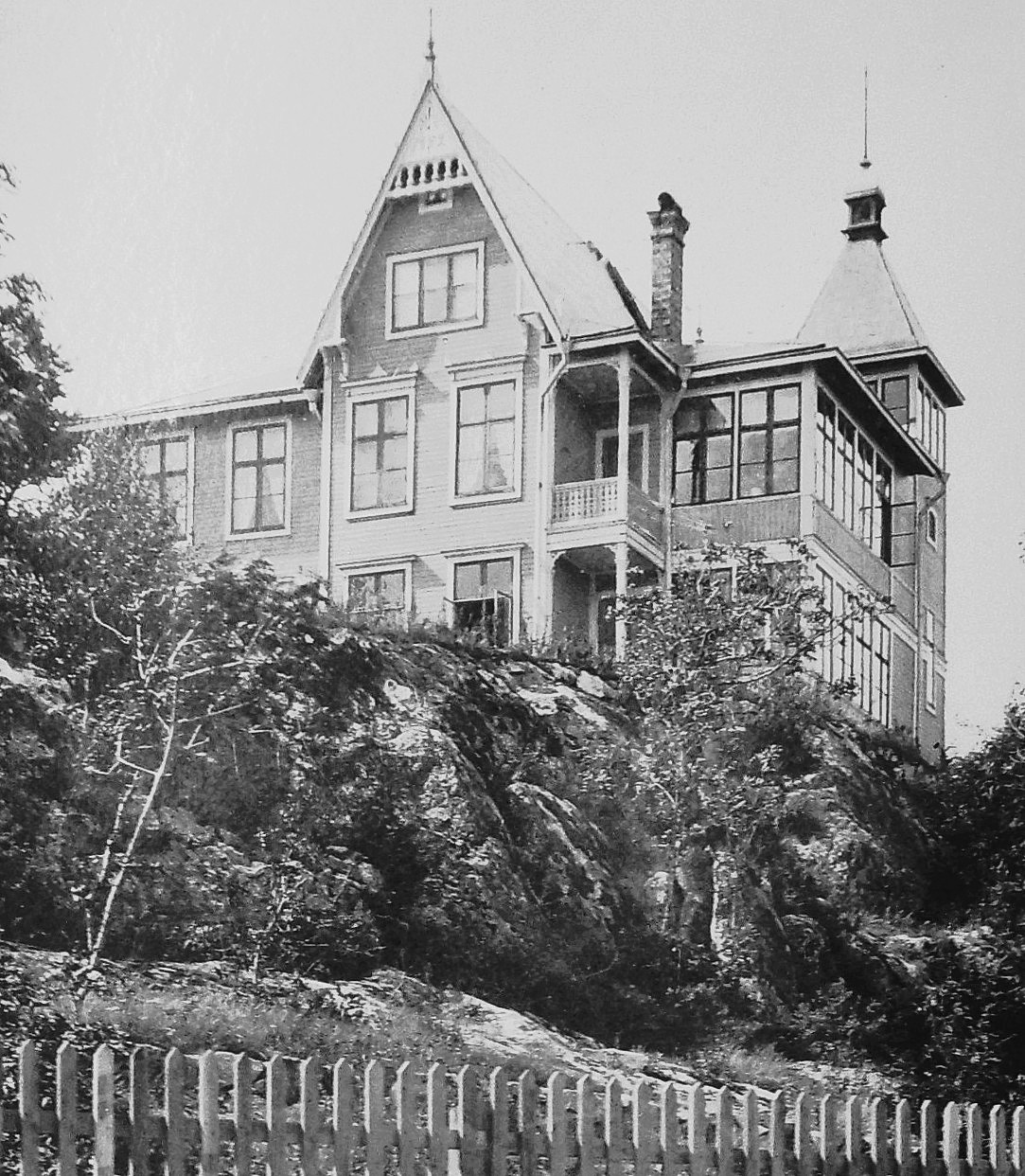 Villa Alphyddan Djursholm, Strandvägen 15, ursprungsarkitekt J.A. Nordström